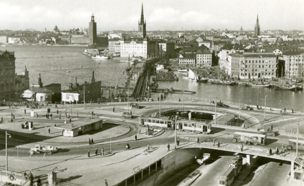 Slussen, Stockholm, utgiven och publicerad på 1930-talet av Axel Eliassons Konstförlag